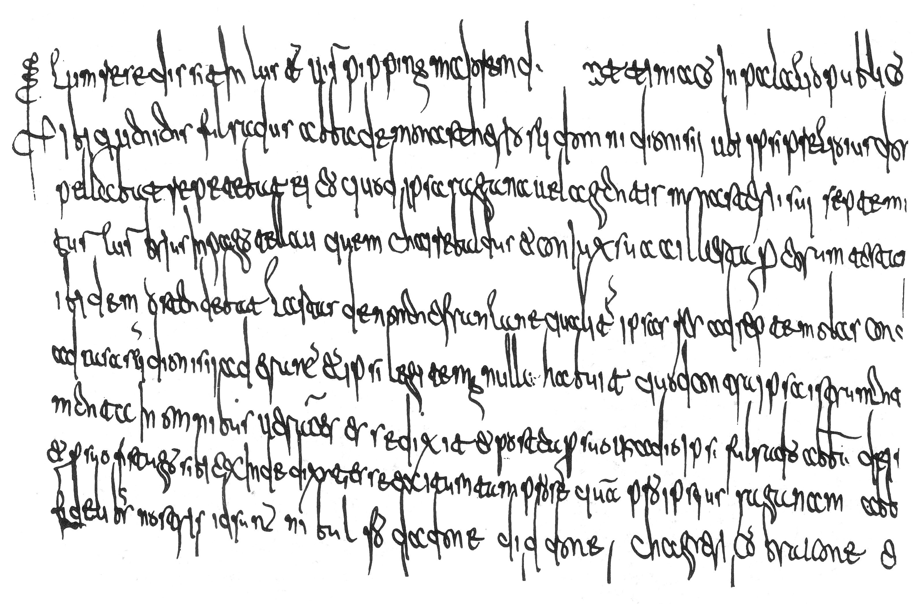 Détail d'un diplôme du 20 juin 750 concernant un jugement rendu à Attigny (Ardennes).